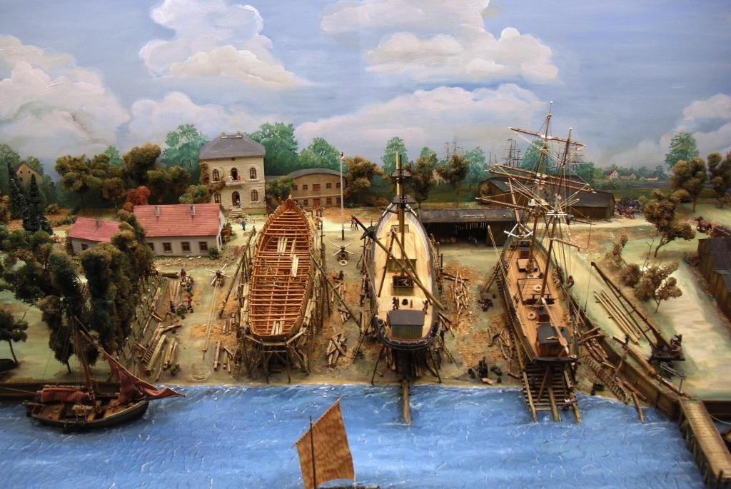 Typische Werft für den Bau von Holzschiffen um 1870 an der Weser, hier Brake